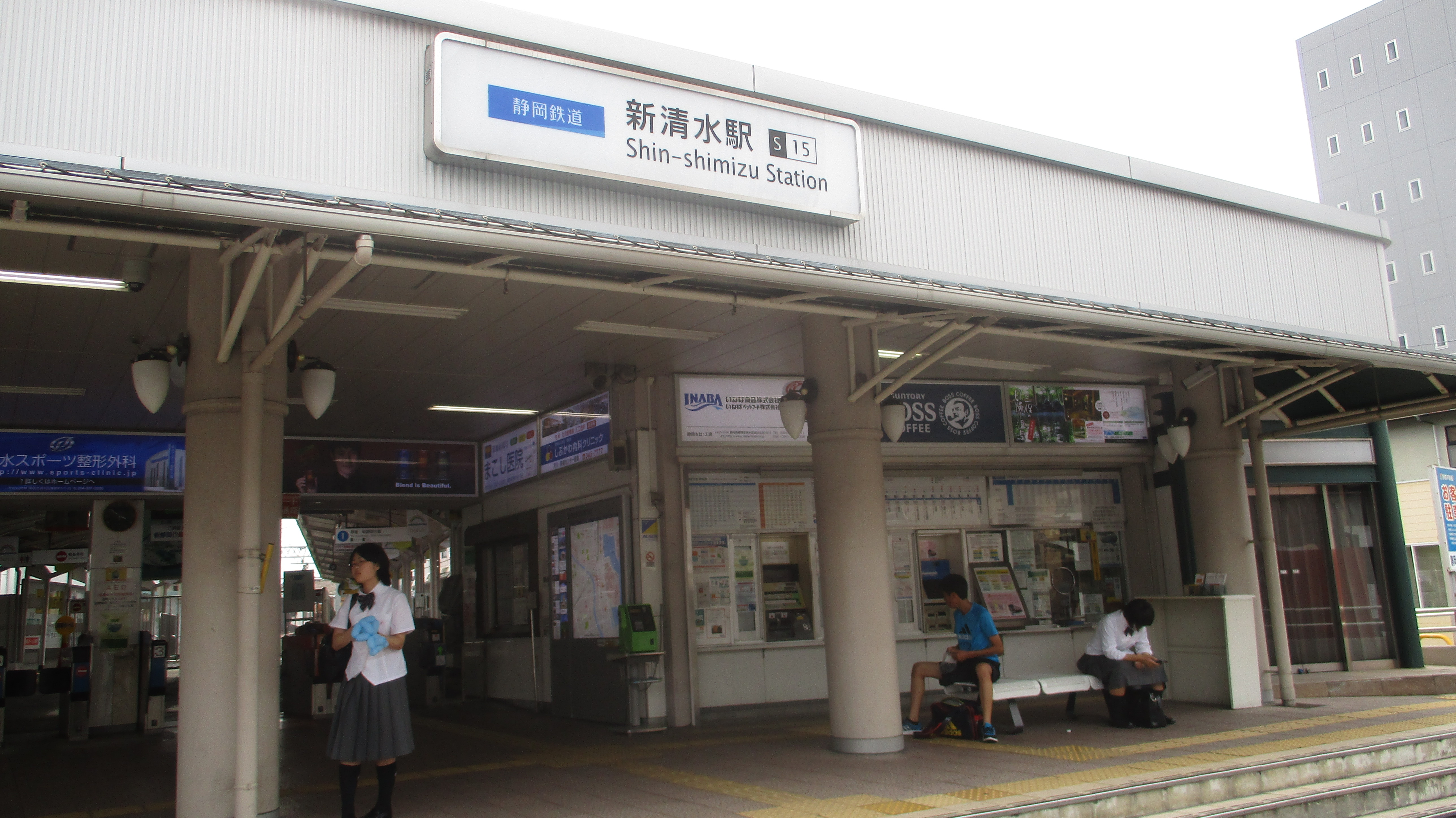 新清水駅(正面口)の駅舎